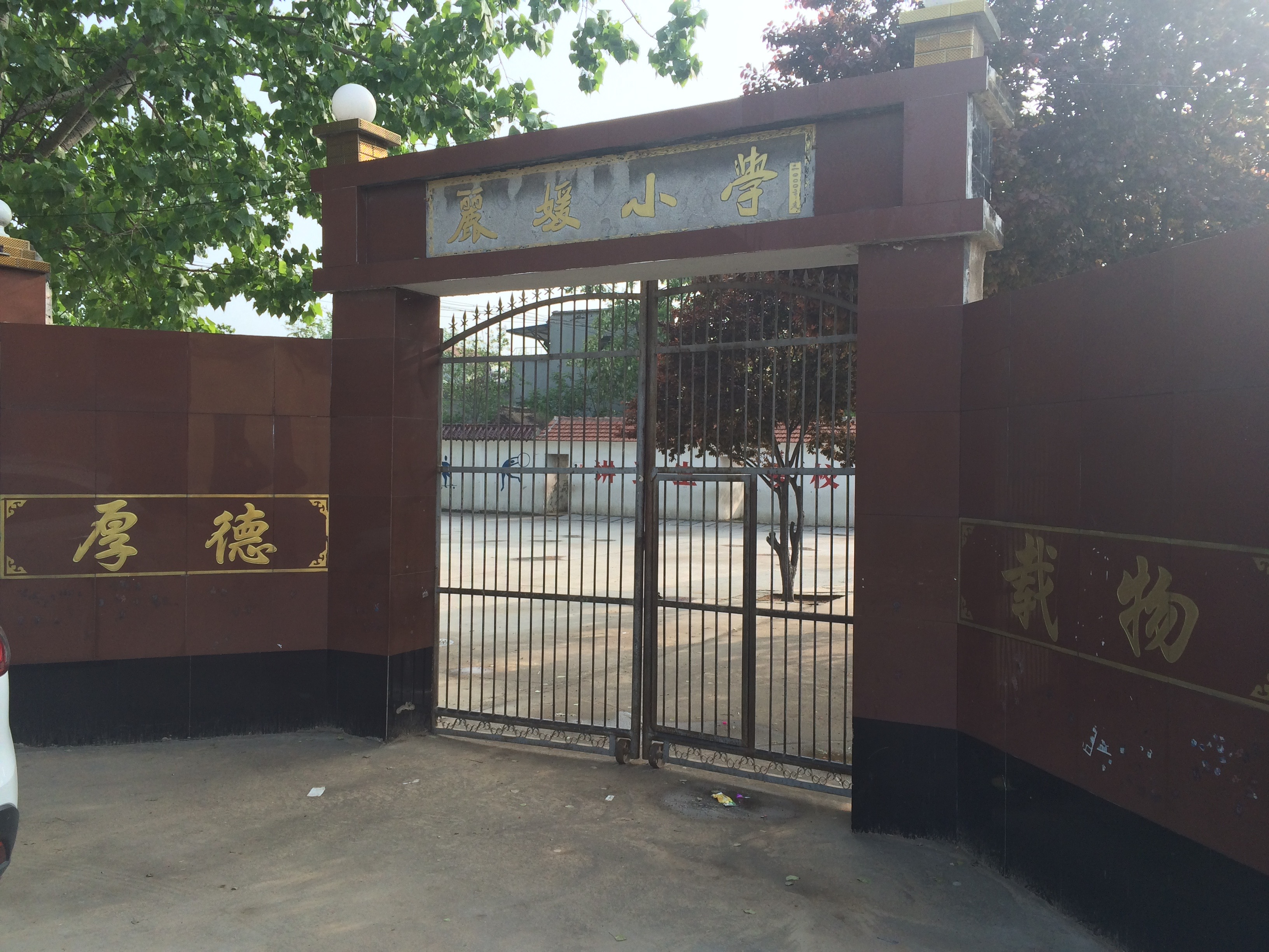 中文（中国大陆）: 彭丽媛捐建的丽媛小学（2015.05）